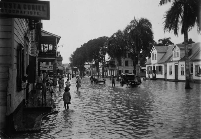 Foto. Suriname: de Dominéstraat te Paramaribo na hevige regen